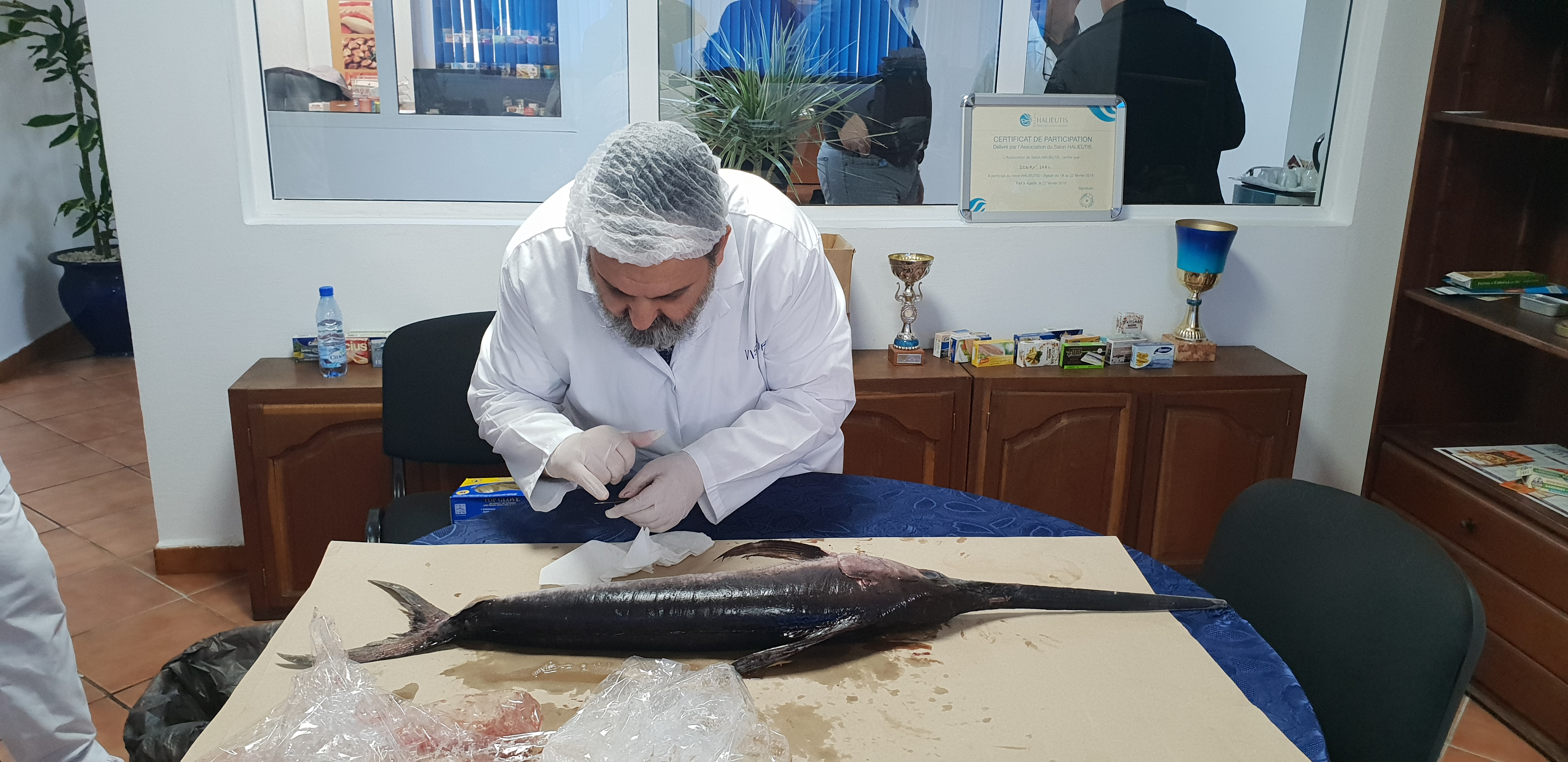 בדיקת קשקשים של דג החרב בתיטואן מרוקו